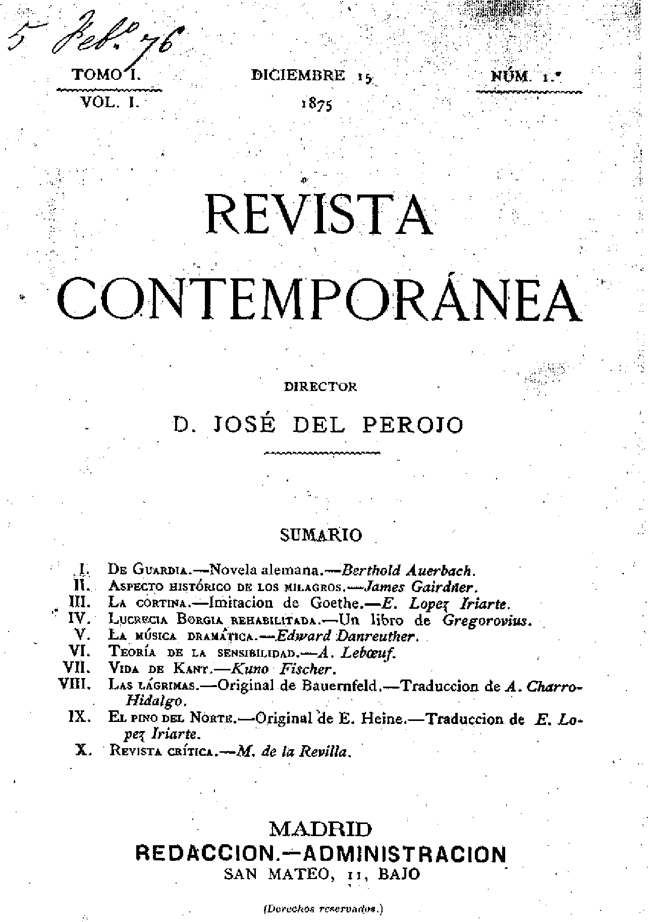 Portada del nº1 de la revista Revista Contemporánea.